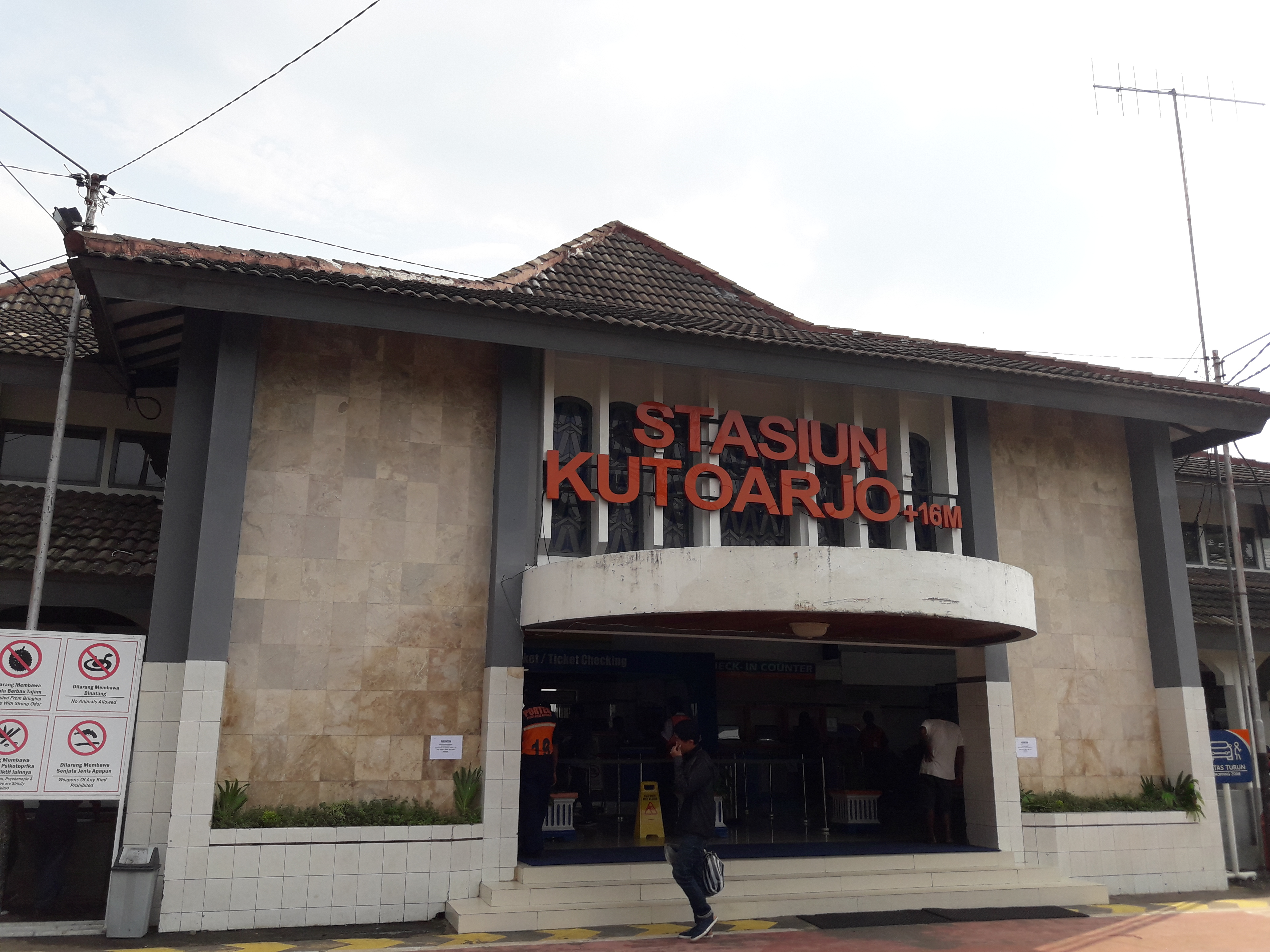 Bangunan depan Stasiun Kutoarjo pada 5 Januari 2019.